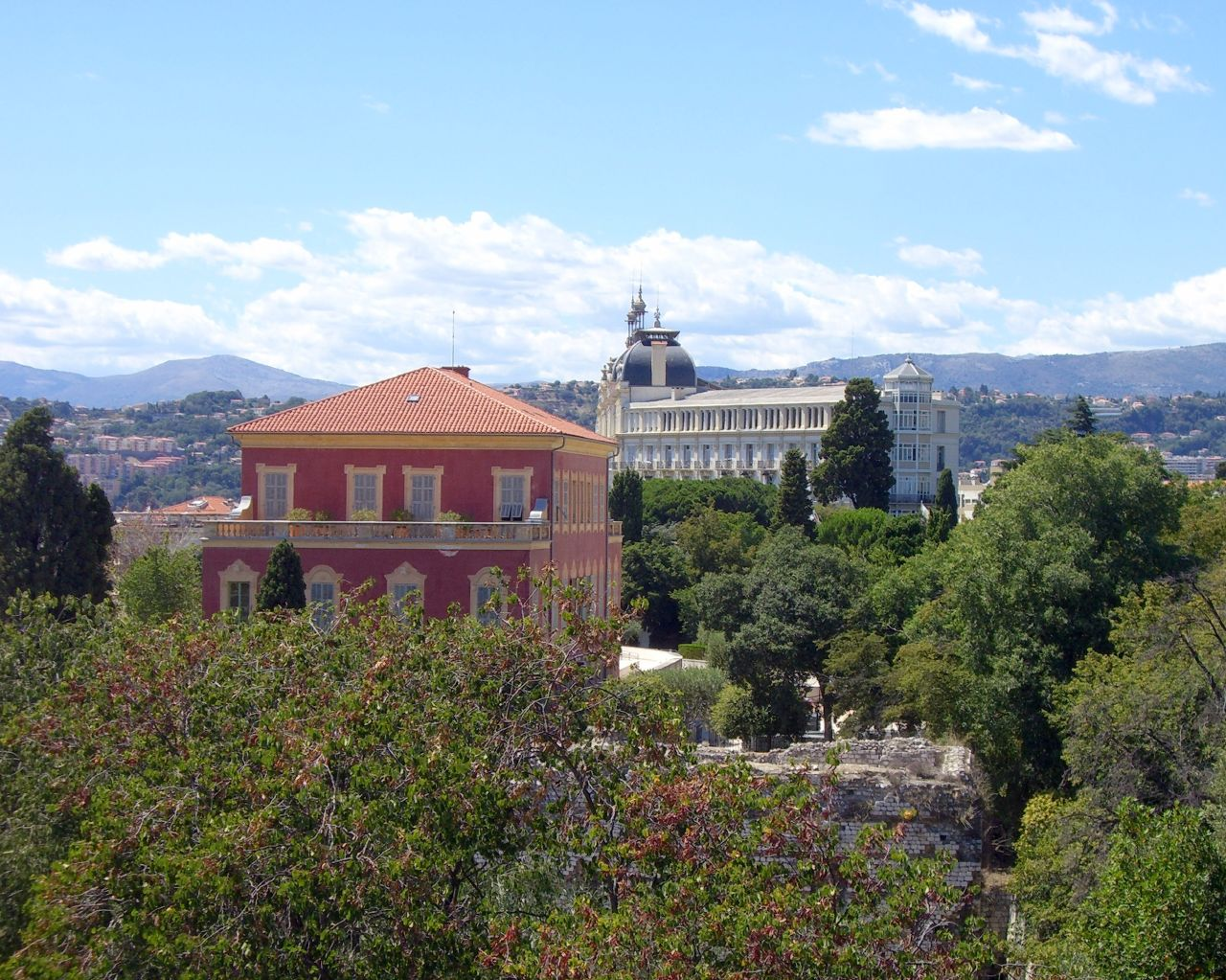 Musee Matisse et à l'arrière l'ancient hôtel Regina où habita Matisse à la fin de sa vie.